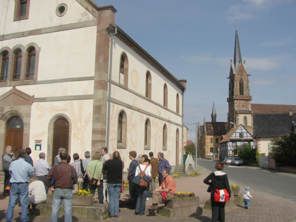 Foto vu dr Synagog un vum Riädminschter z Mackene- Synagogue de Mackenheim D Synagog isch links un wirkt wäge däre Witwinkelufnahm im Verhältnis zum Minschter (rächts) greßer, wiä si isch. S gleiner Dirmli no dr Kirch ghert zum Rothüüs (Mairie).